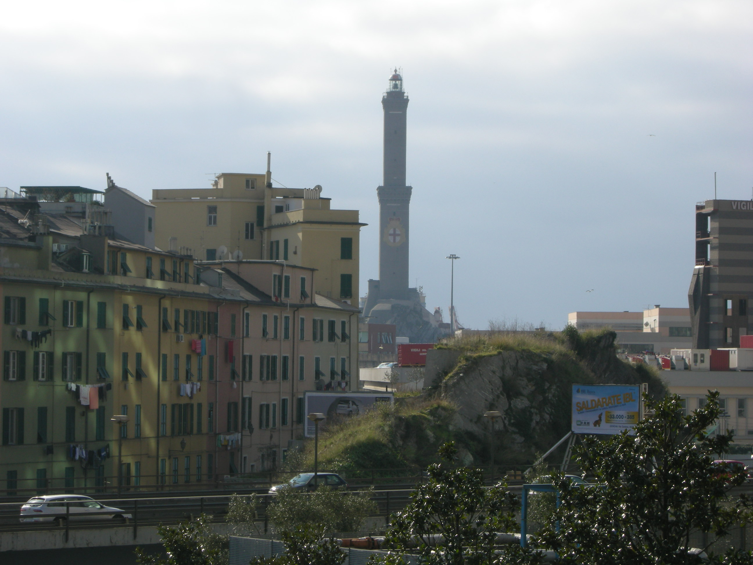 Genova, lanterna